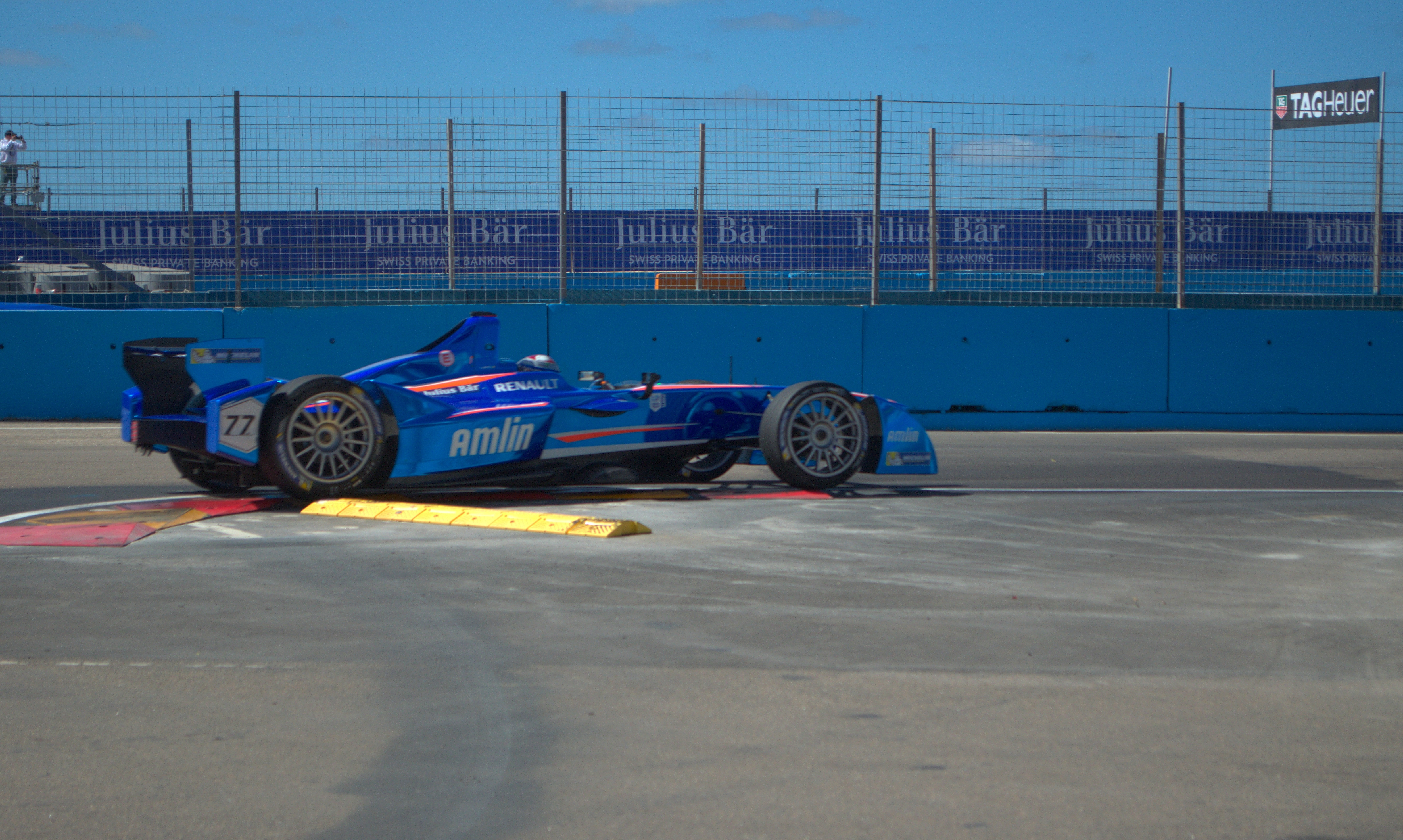 Solo se permite el uso de esta imagen mencionando a Velocidad Total como su autor. Imagen del equipo Amlin Aguri de Fórmula E, durante el Punta del Este ePrix de 2014.